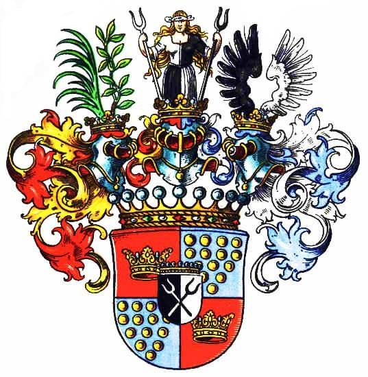 Wappen der Grafen von Kalckreuth (Linie Klemzig des Gesamtgeschlechts derer von Kalckreuth).